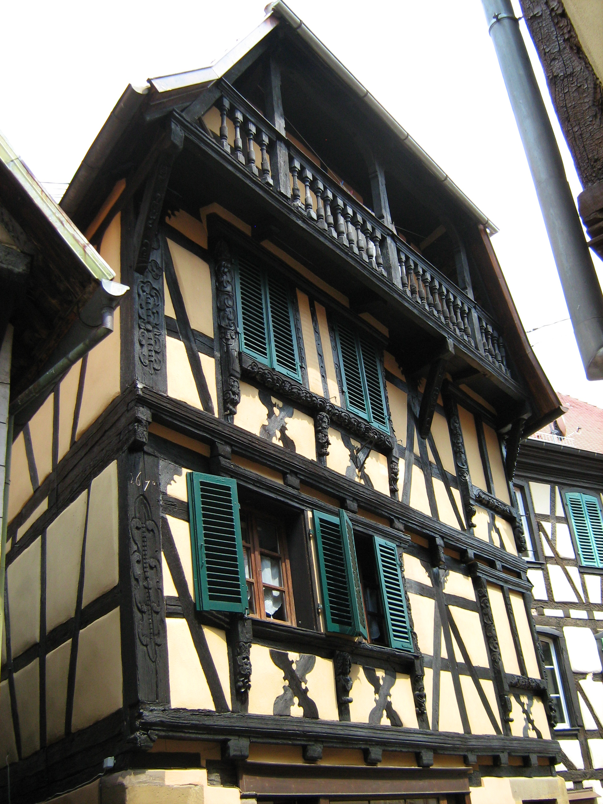 maison Siegler à Bouxwiller (67), année 1670, façade sculptée.